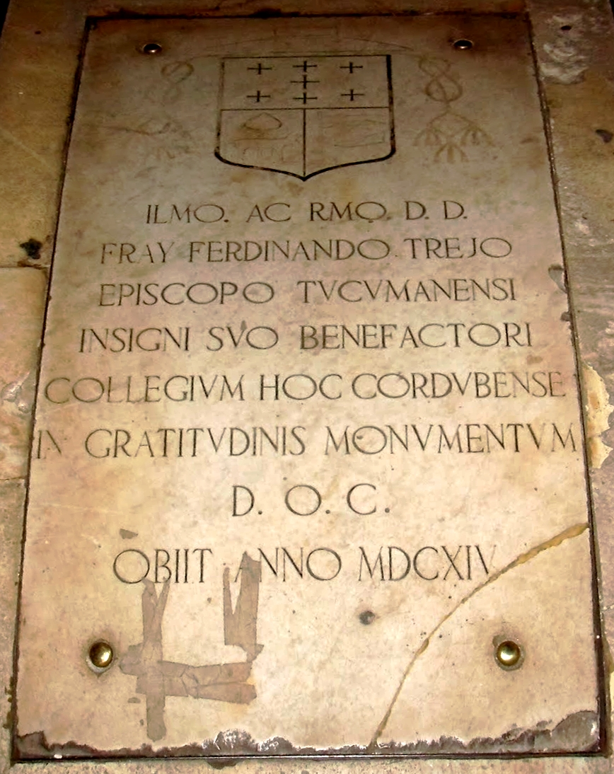 Lápida del Obispo Trejo y Sanabria. Se encuentran en la iglesia de la Compañía de Jesús de Córdoba.